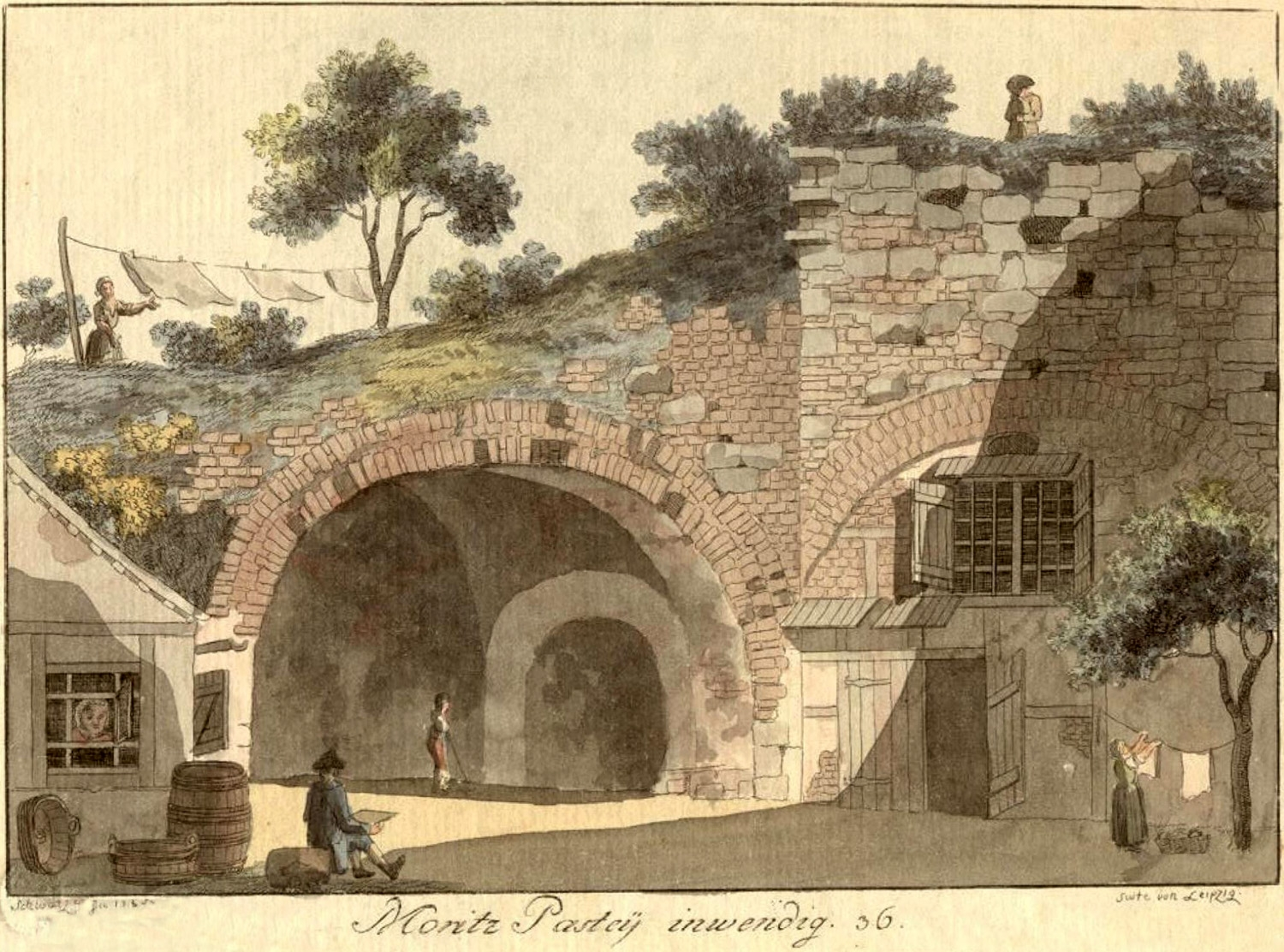 Die Moritzbastei Leipzig um das Jahr 1785